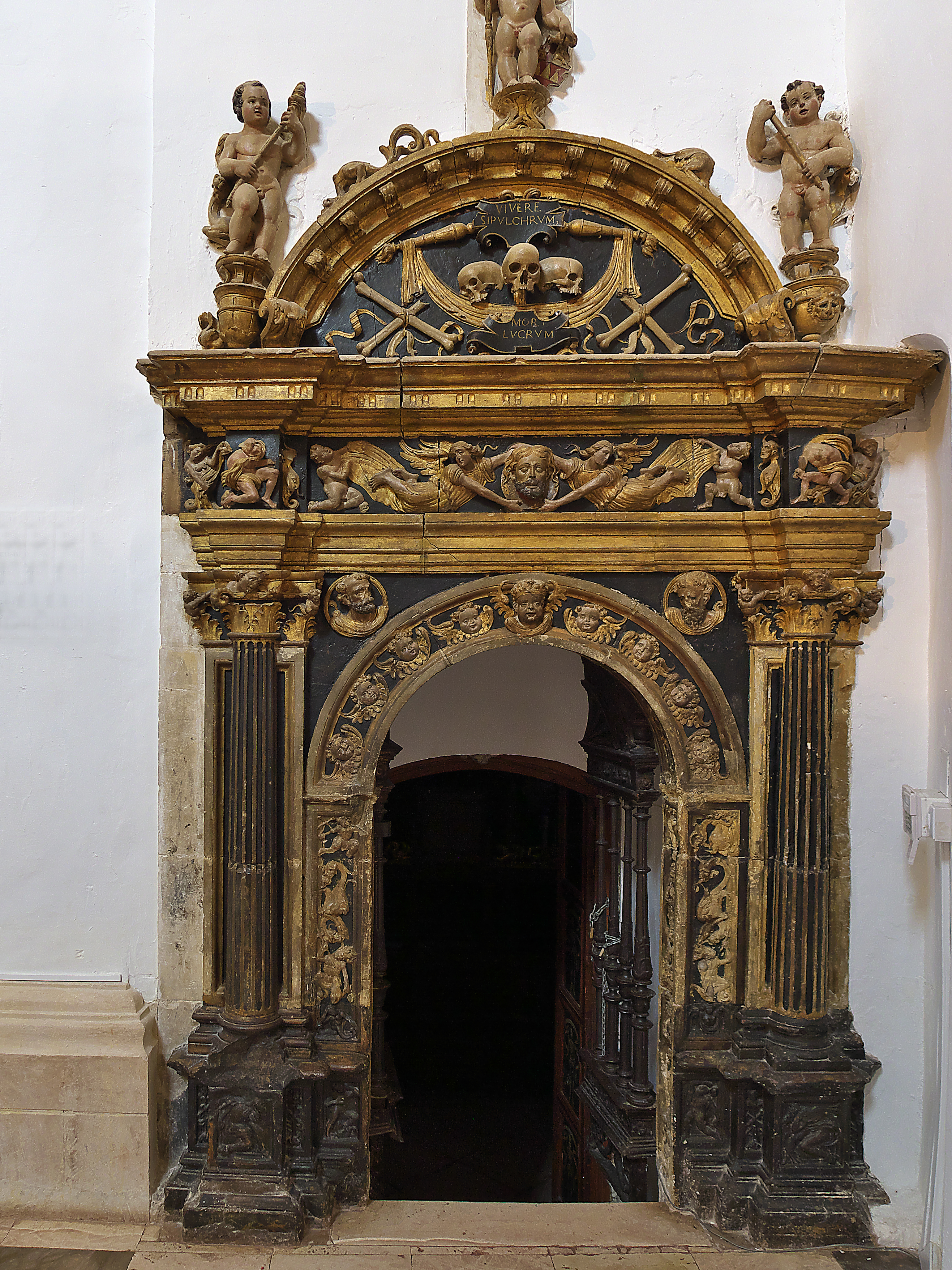 Puerta de acceso al Santo Sepulcro.